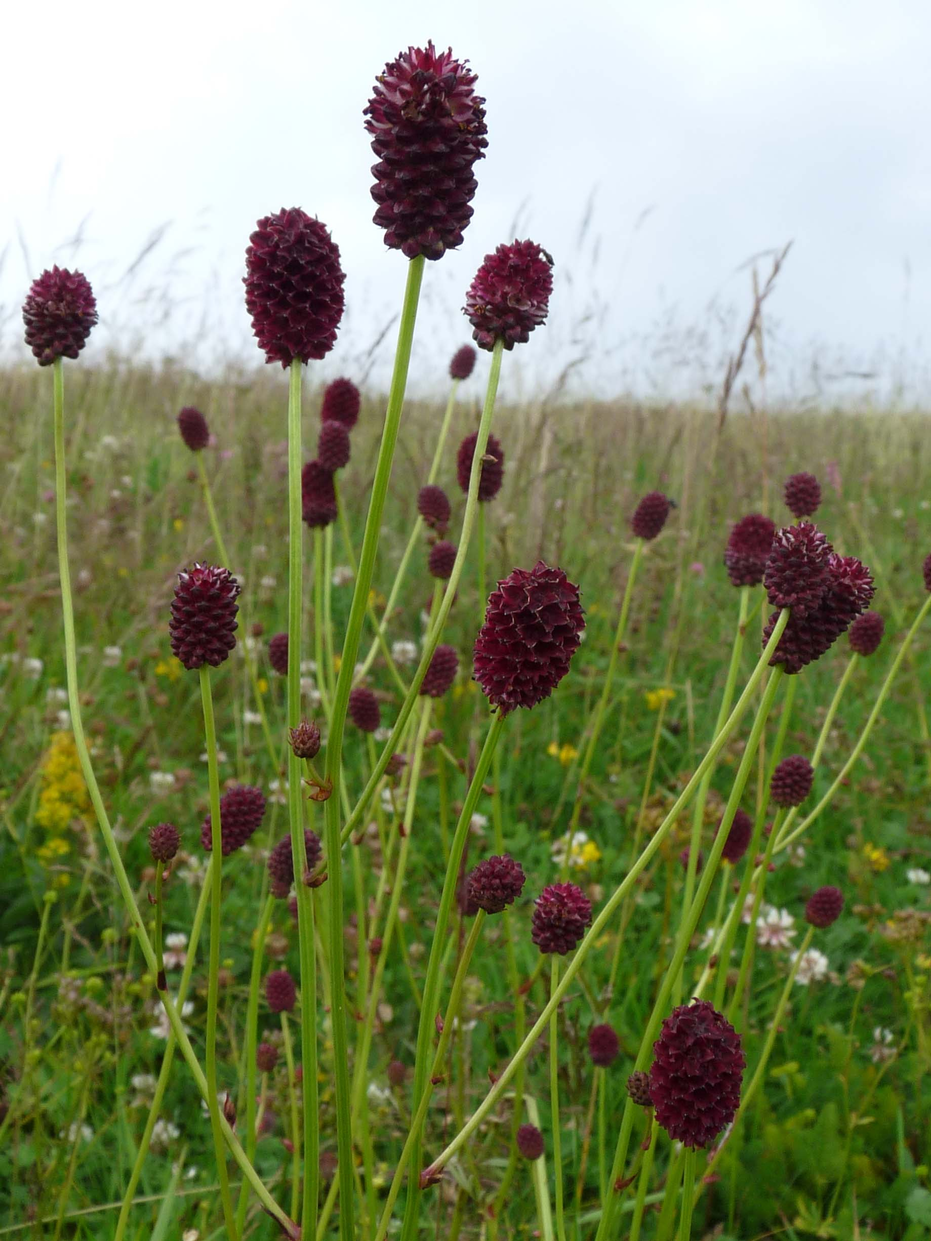 Sanguisorbe officinale (Sanguisorba officinalis) à la source de la Duchesse, à proximité du Kastelberg, Vosges (France)